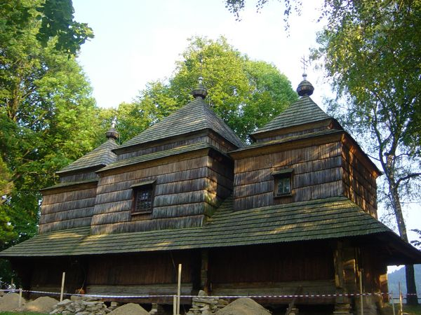 Smolnik (powiat bieszczadzki) - cerkiew. Autor: wikipedysta:Frankee, 2005